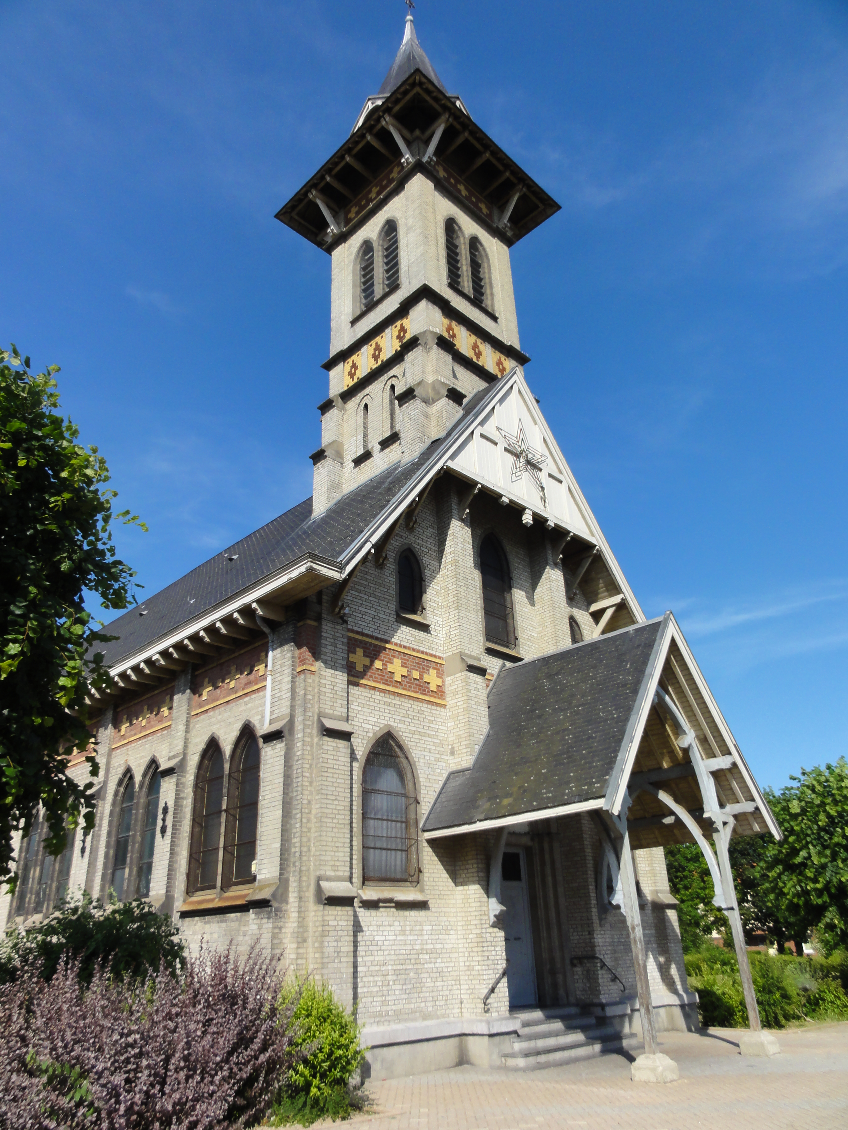 Église Saint-Auguste des cités de la Fosse n° 8 - 8 bis de la Compagnie des mines de Lens, Vendin-le-Vieil, Pas-de-Calais, Nord-Pas-de-Calais, France.